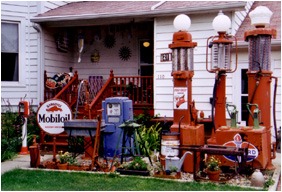 Petrol pumps